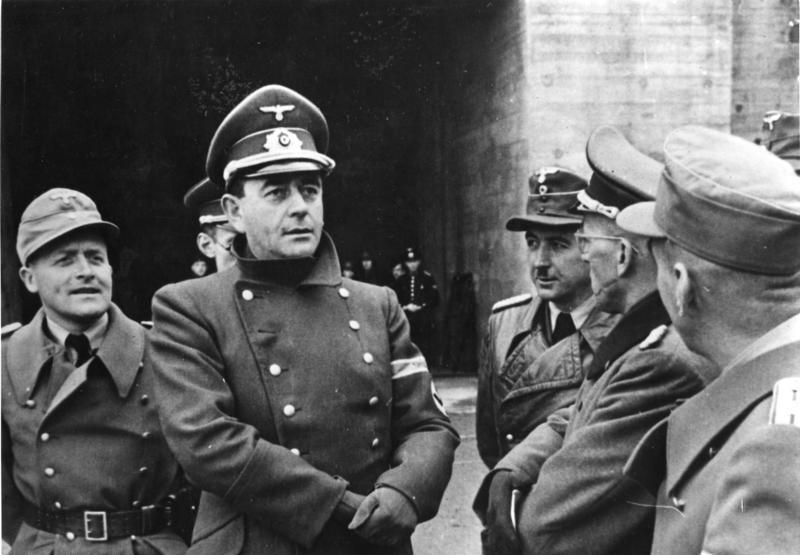 Zentralbil, II. Weltkrieg 1939 - 45 Mai 1943: Der Chef der OT (Organisation Todt) Reichsminister für Bewaffnung und Munition Albert Speer besichtigt mit dem Leiter der OT-Zentrale, Ministerialdirektor [Xaver] Dorsch (rechts) Befestigungsanlagen am Atlantikwall.